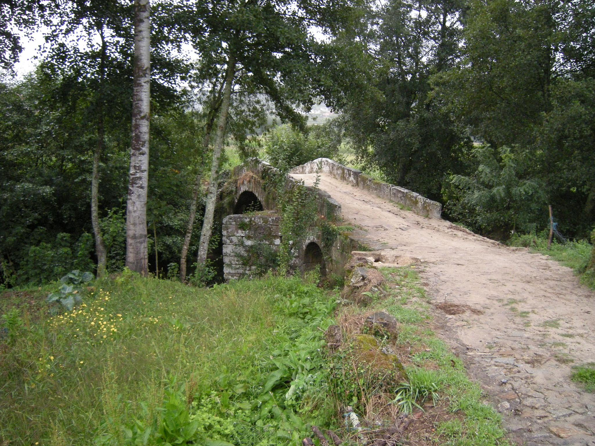 Puente romano sobre el río Coura.